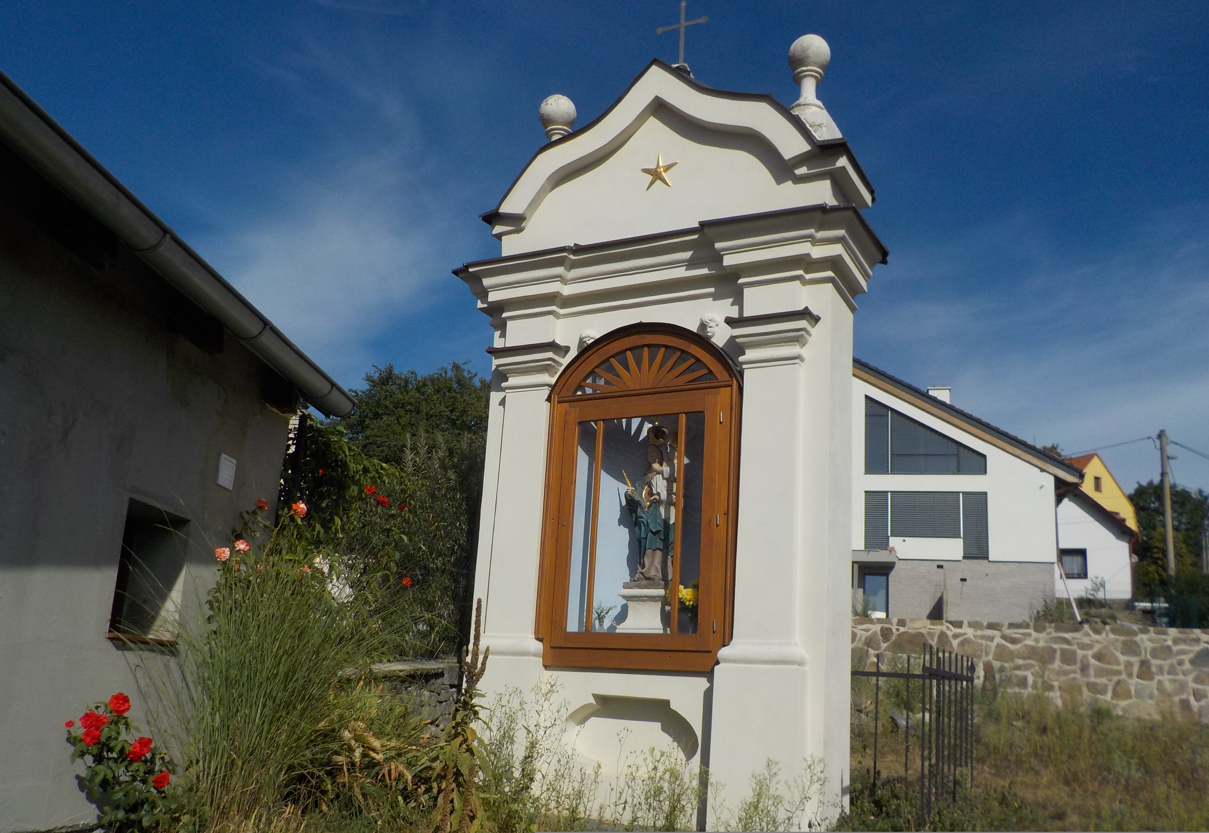 Iesus Nasarenus Rex Iudeum